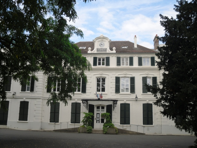 L'hôtel de ville de Draveil (91)